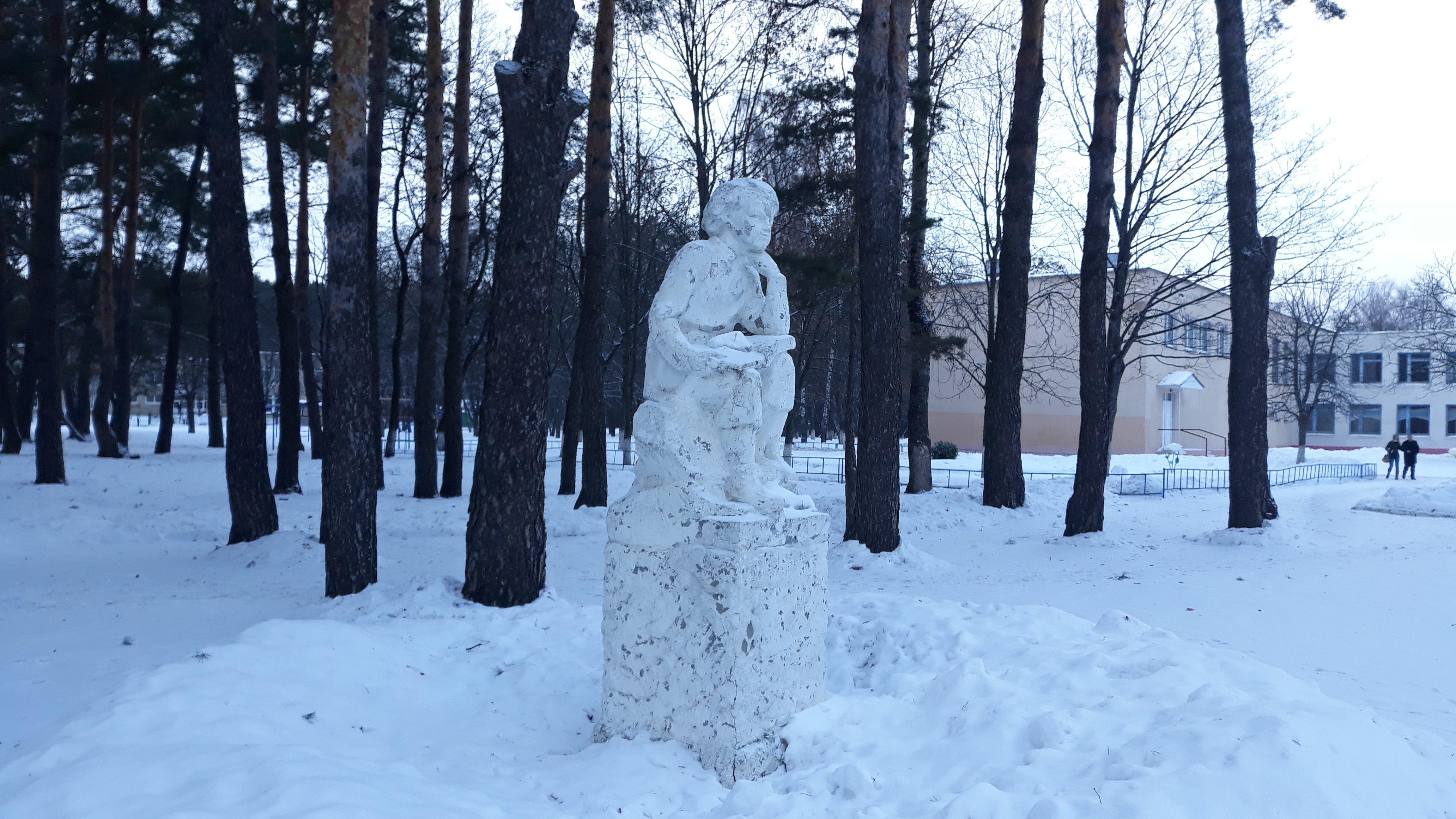 Скульптура школьніка ў безыменным скверы, між 5 і 6 школамі ў Светлагорску